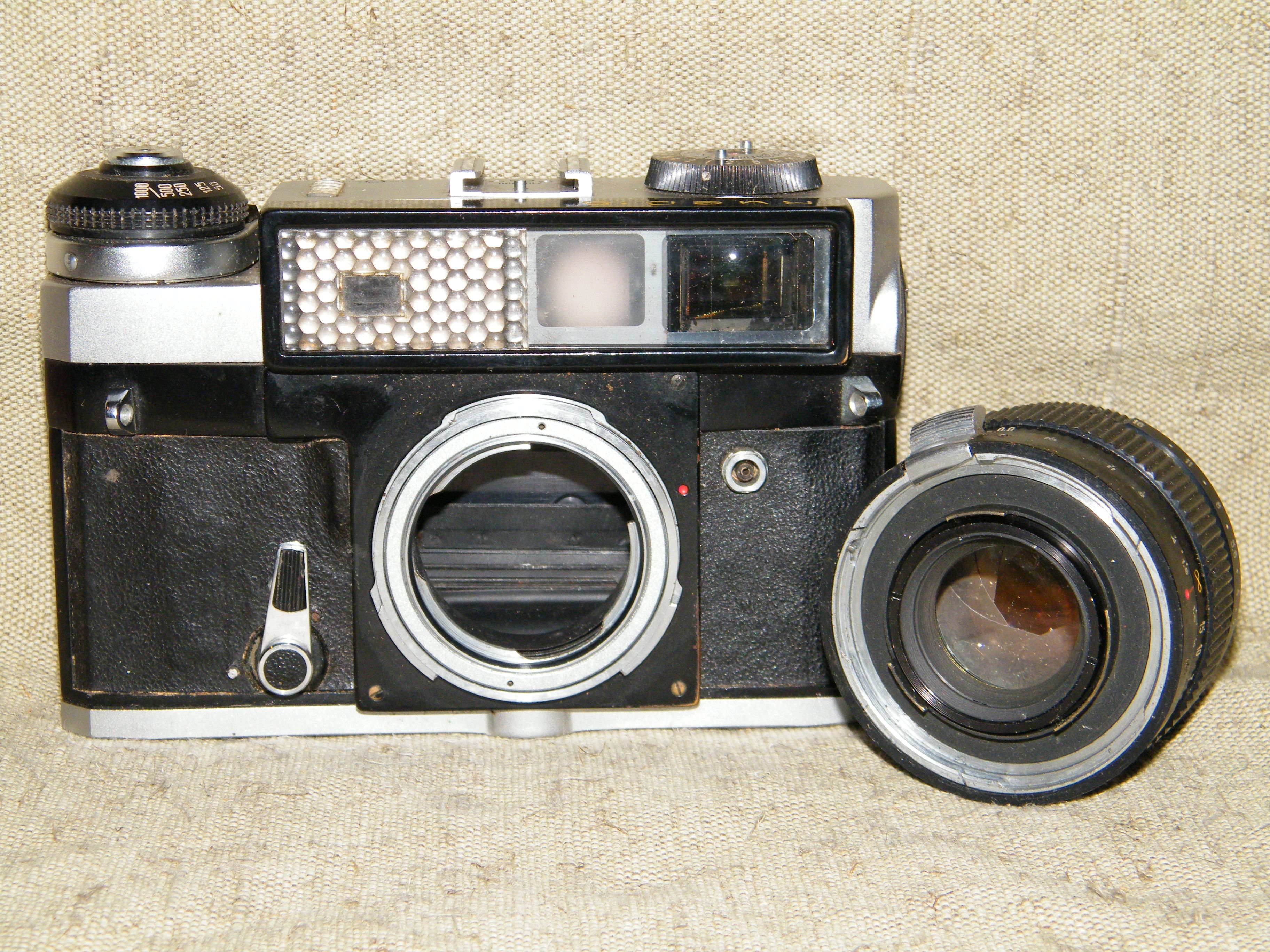 Kiev 5 rangefinder